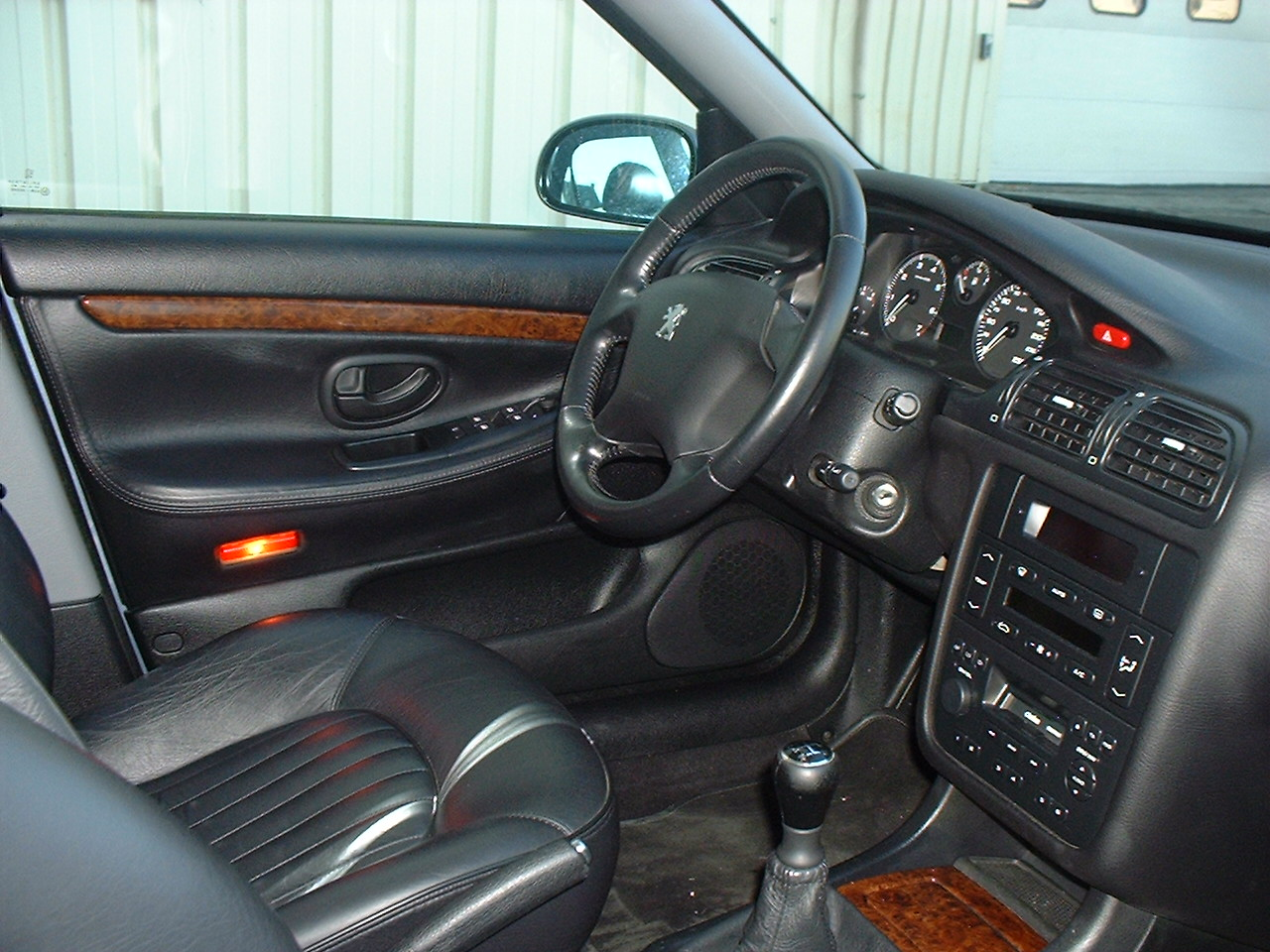 406 - 2001 - 2.2 16v 160ch - finition SVE